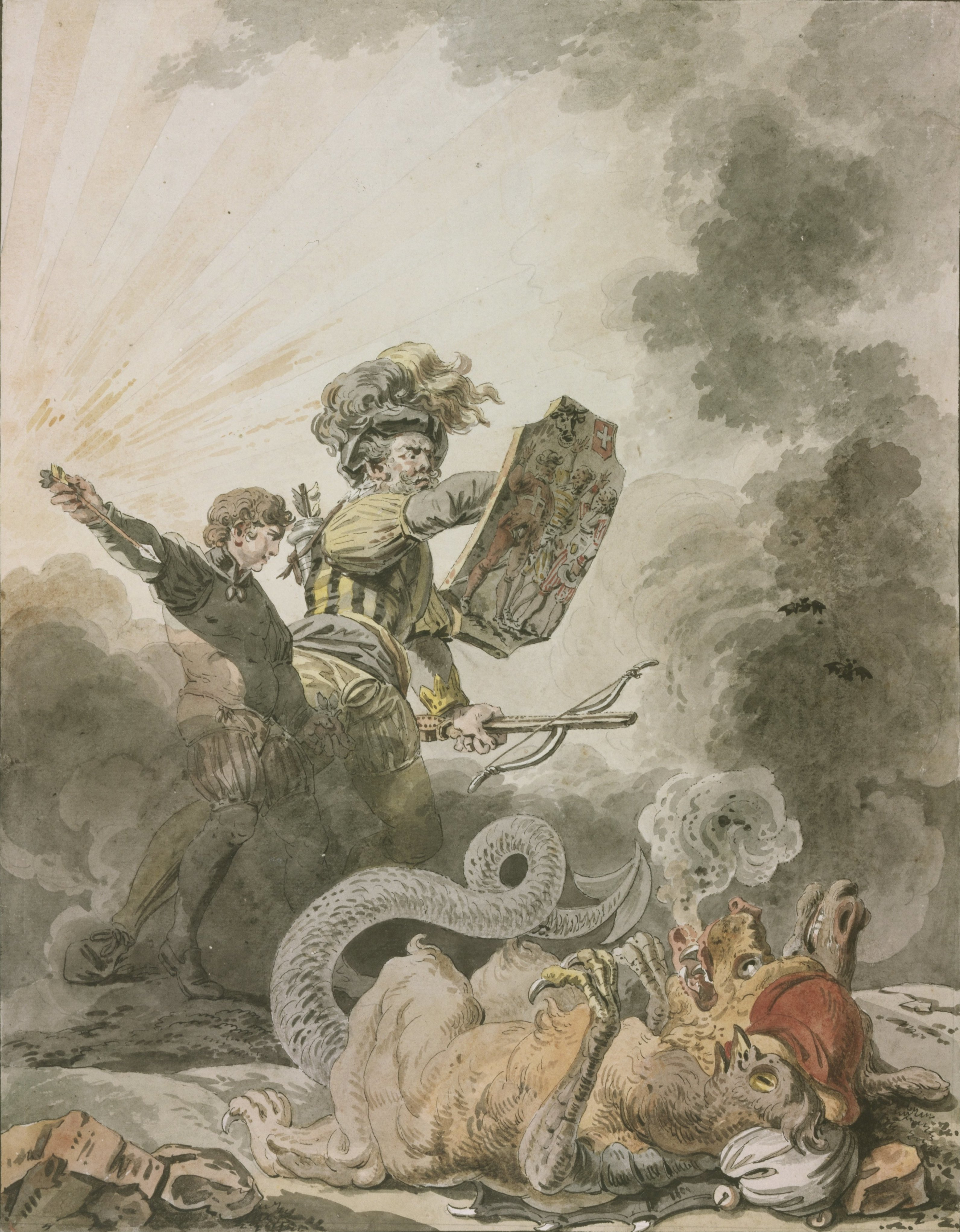 Balthasar Anton Dunker: Wilhelm Tell bekämpft die Revolution, aquarellierte Federzeichnung, um 1798. Schweizerisches Landesmuseum, LM-20965. Das Bild wurde möglicherweise gespiegelt, vgl. [1] Das Bild zeigt Wilhelm Tell und seinen Sohn, wie sie die Revolution bekämpfen. Diese ist als Drache beziehungsweise Chimäre mit drei Köpfen dargestellt. Der Hundekopf trägt eine Jakobinermütze, der Hahnenkopf eine Narrenkappe mit Schellen, während der Eselskopf nur teilweise zu erkennen ist. Der von der Sonne beschienene Tell greift nicht mit der Armbrust an, sondern verteidigt mit einem Schild, auf dem die drei Eidgenossen des Bundesschwurs auf dem Rütli zu sehen sind. Der historische Hintergrund des Werks ist der Abwehrkampf der Alten Eidgenossenschaft gegen ihre Revolutionierung mit Hilfe französischer Truppen im Jahr 1798. Am 25. Januar 1798 wurden in Aarau ein letztes Mal die bestehenden Bünde beschworen, bevor die Alte Eidgenossenschaft auseinanderbrach und unterging.